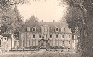 Château de la Grande Haye ayant appartenu à Paul de Breuvery